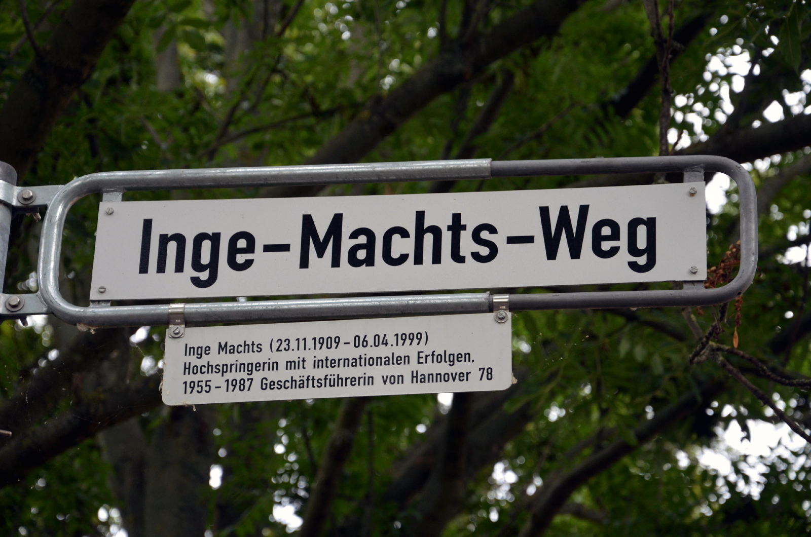 Auf Beschluß des Stadtrates von Hannover wurde im November 2010 ein im Sportpark hinter den Gebäuden des LandesSportBunds Niedersachsen gelegener Weg nach der Sportlerin Inge Machts benannt. Eine gesondert am Straßenschild installierte Legendentafel erläutert: „Inge Machts (23.11.1909 - 06-04.1999), Hochspringerin mit internationalen Erfolgen, 1955 - 1987 Geschäftsführerin von Hannover 78“ ...